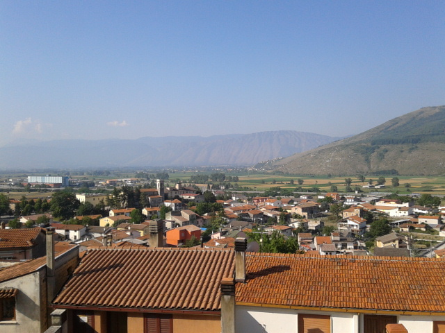 Panoramica sui piani Palentini